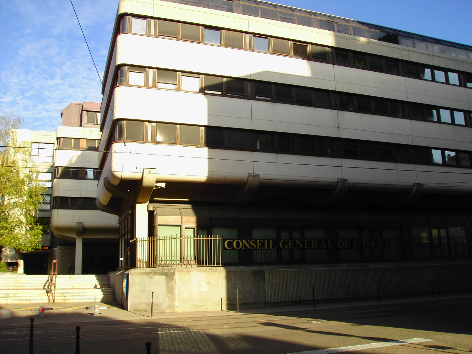 Conseil Général de l'Isère